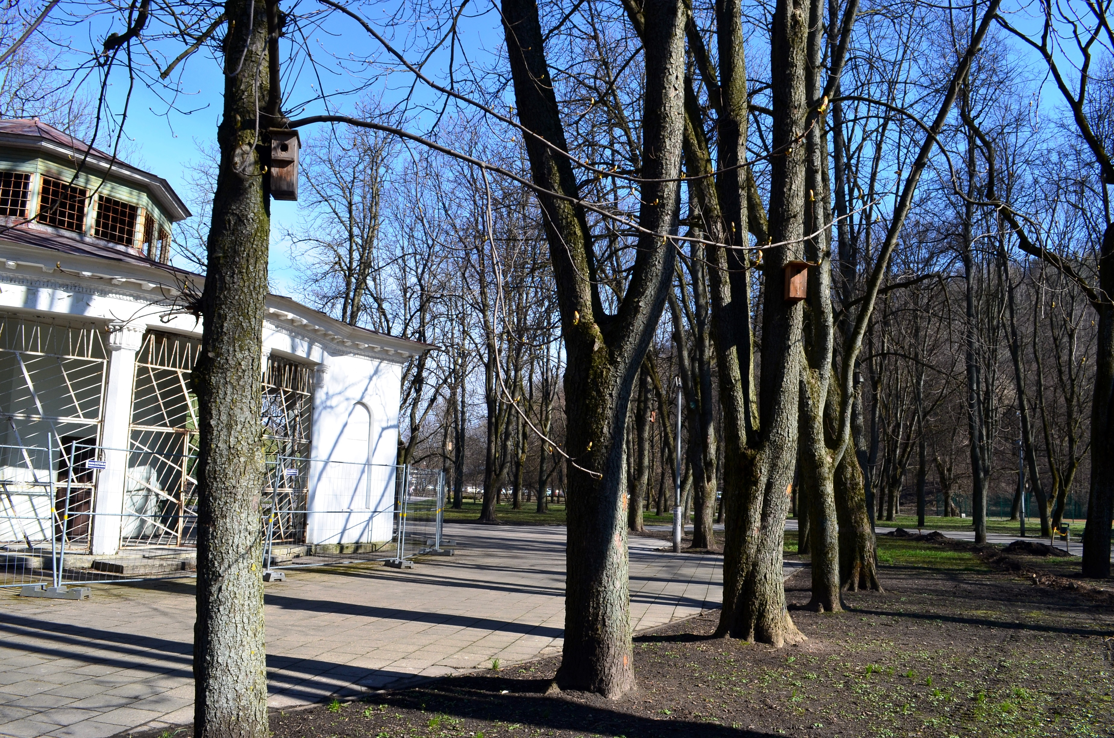 Kaštonų ratas aplink kavinę „Rotonda“, Vilnius